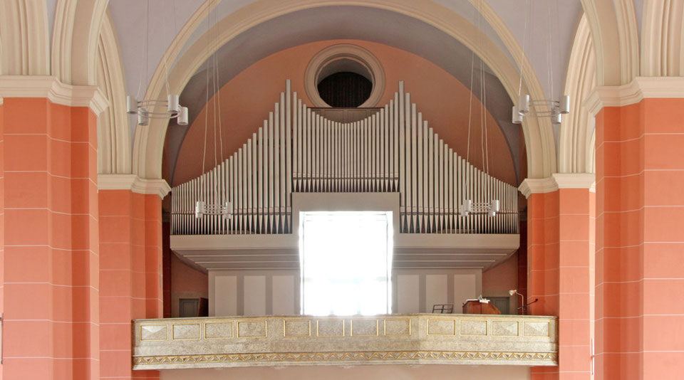 Kauffmann Orgel Pfarrkirche Meidling